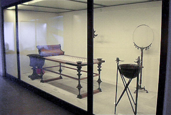 Klinê : lit antique, probablement du 2e-1er siècle avant notre ère. Mobilier des fouilles de Mahdia reconstitué au Musée national du Bardo (Tunisie)